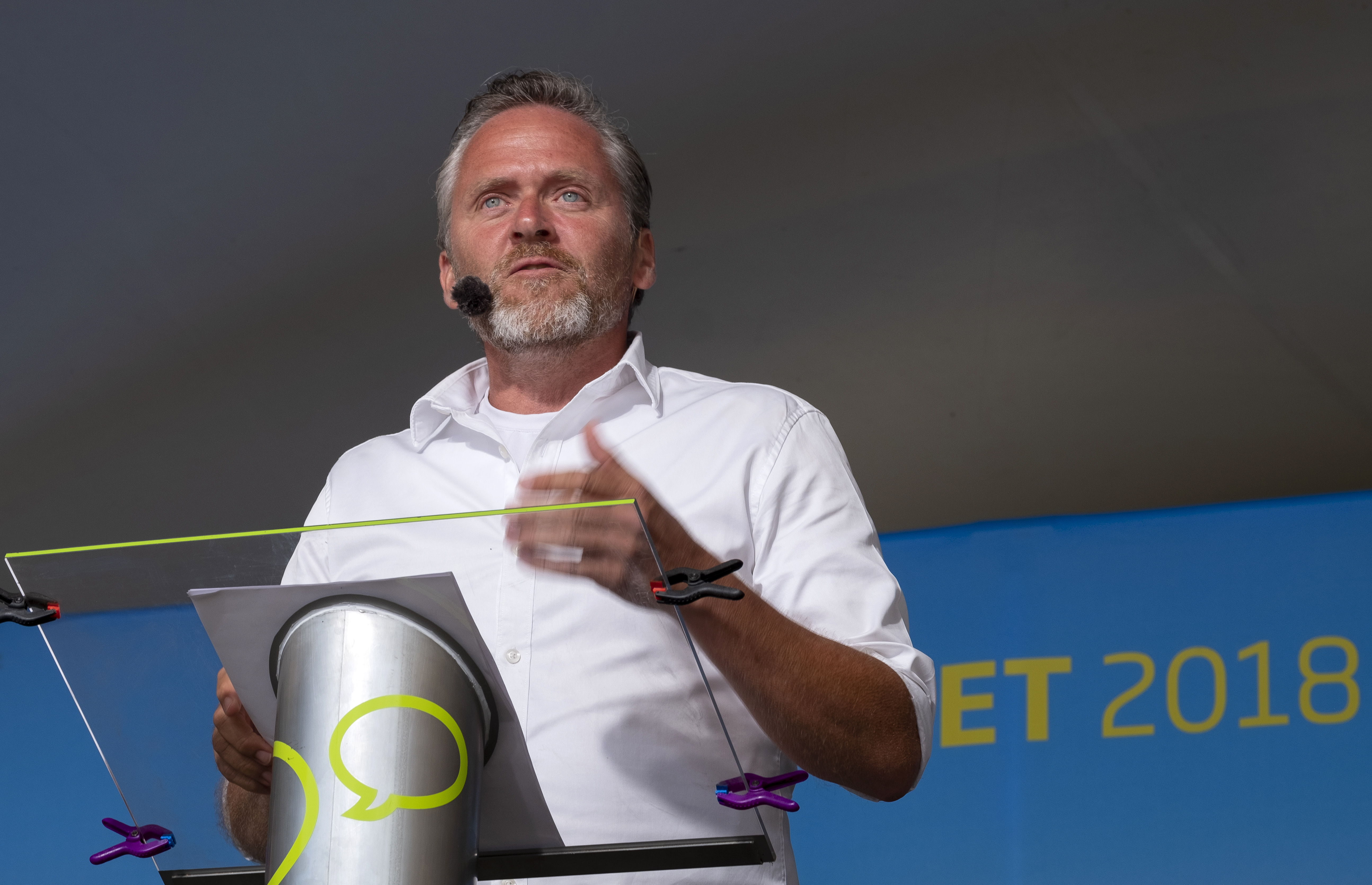 Folkemødet i Allinge på Bornholm. Photo: News Øresund - Johan Wessman © News Øresund - Johan Wessman (CC BY 3.0). Detta verk av News Øresund är licensierat under en Creative Commons Erkännande 3.0 Unported-licens (CC BY 3.0). Bilden får fritt publiceras under förutsättning att källa anges. .The picture can be used freely under the prerequisite that the source is given. News Øresund, Malmö, Sweden News Øresund är en oberoende regional nyhetsbyrå som är en del av det oberoende dansk-svenska kunskapscentrat Øresundsinstituttet.. .